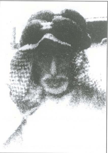 الشيخ حمد بن عبدالله بن صالح بن محمد بن ابراهيم الخميس الناصري التميمي